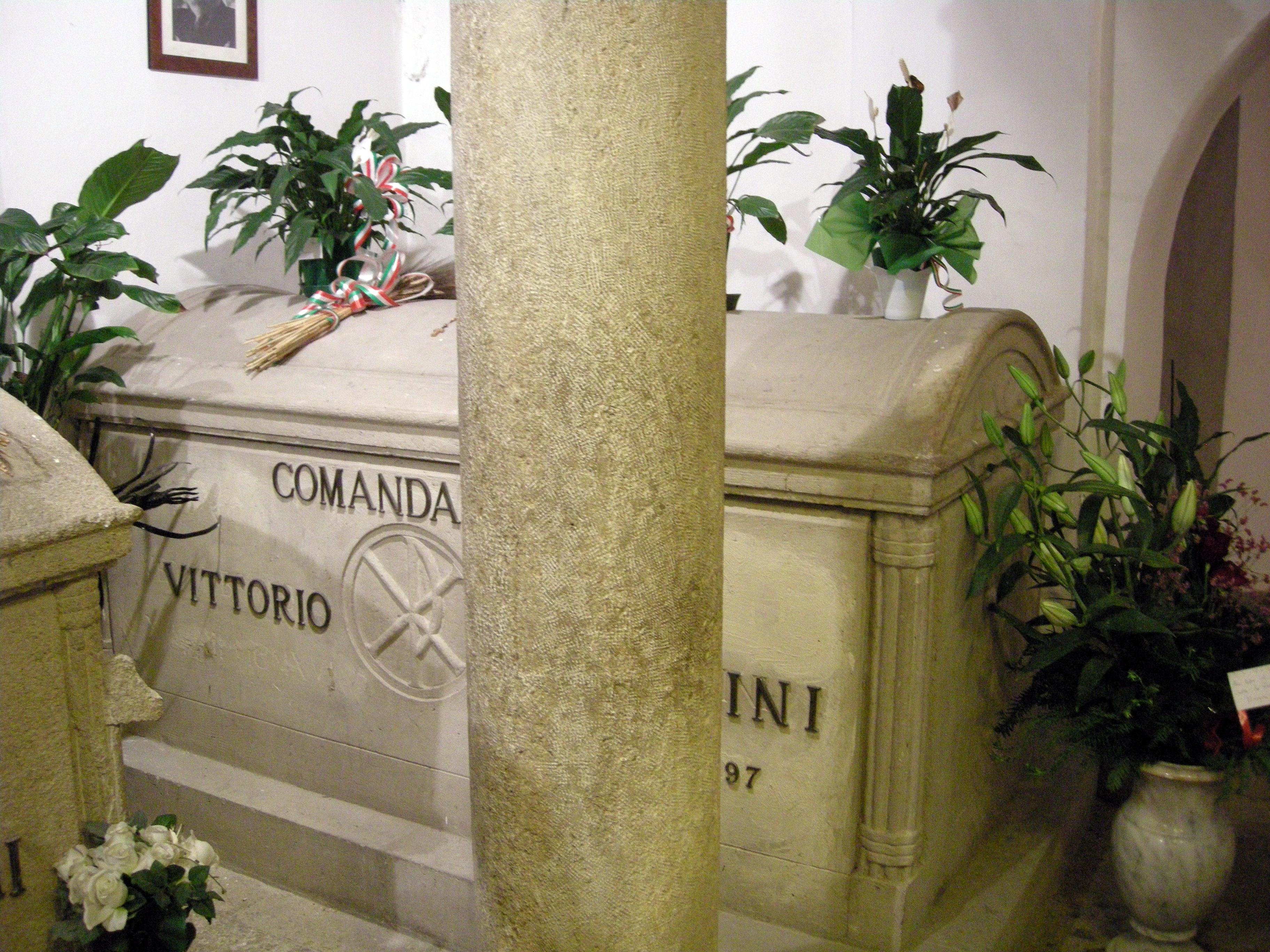 Cripta del cimitero di San Cassiano a Predappio, tombe della famiglia Mussolini